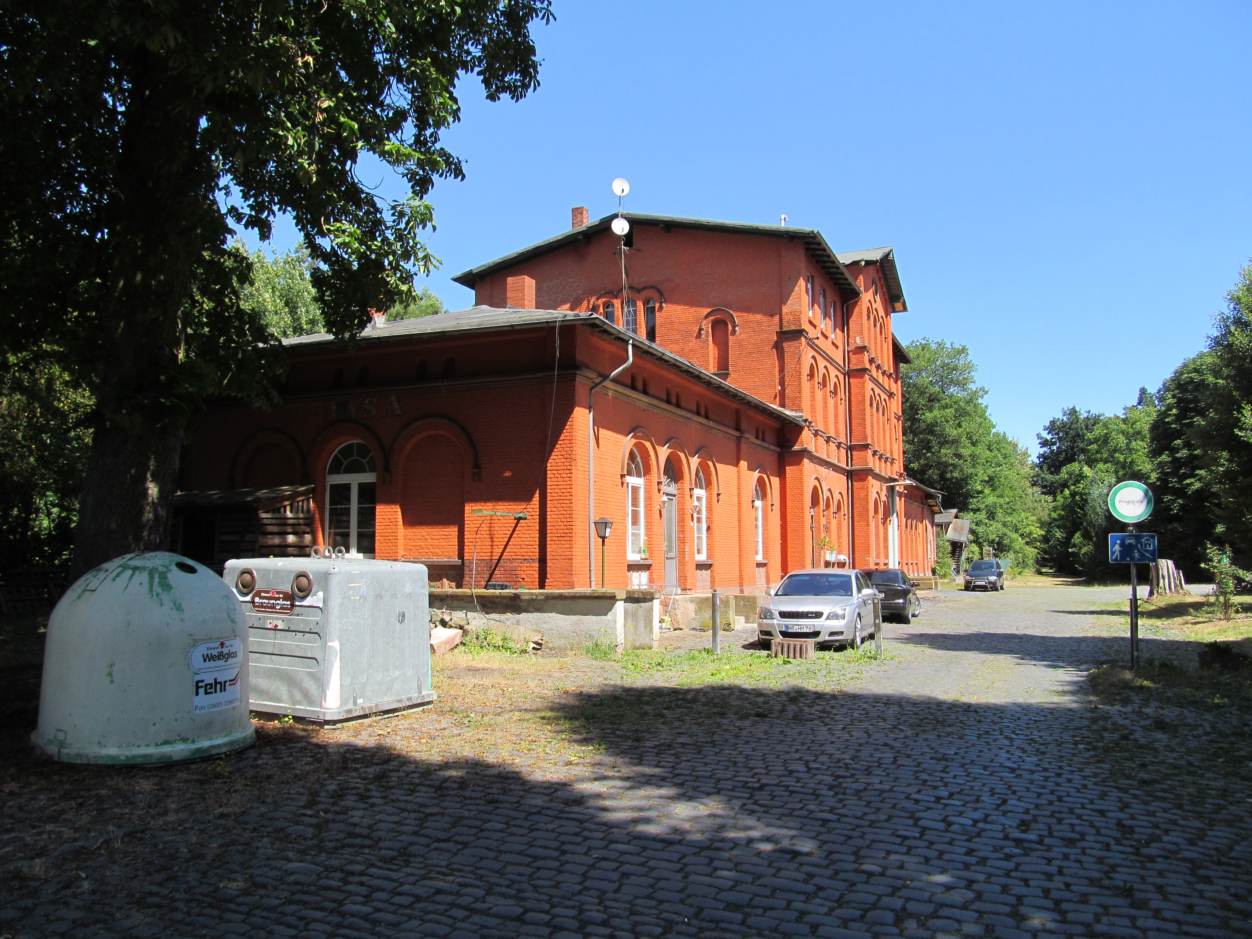 der alte Bahnhof an der Main-Weser-Bahn in Treysa